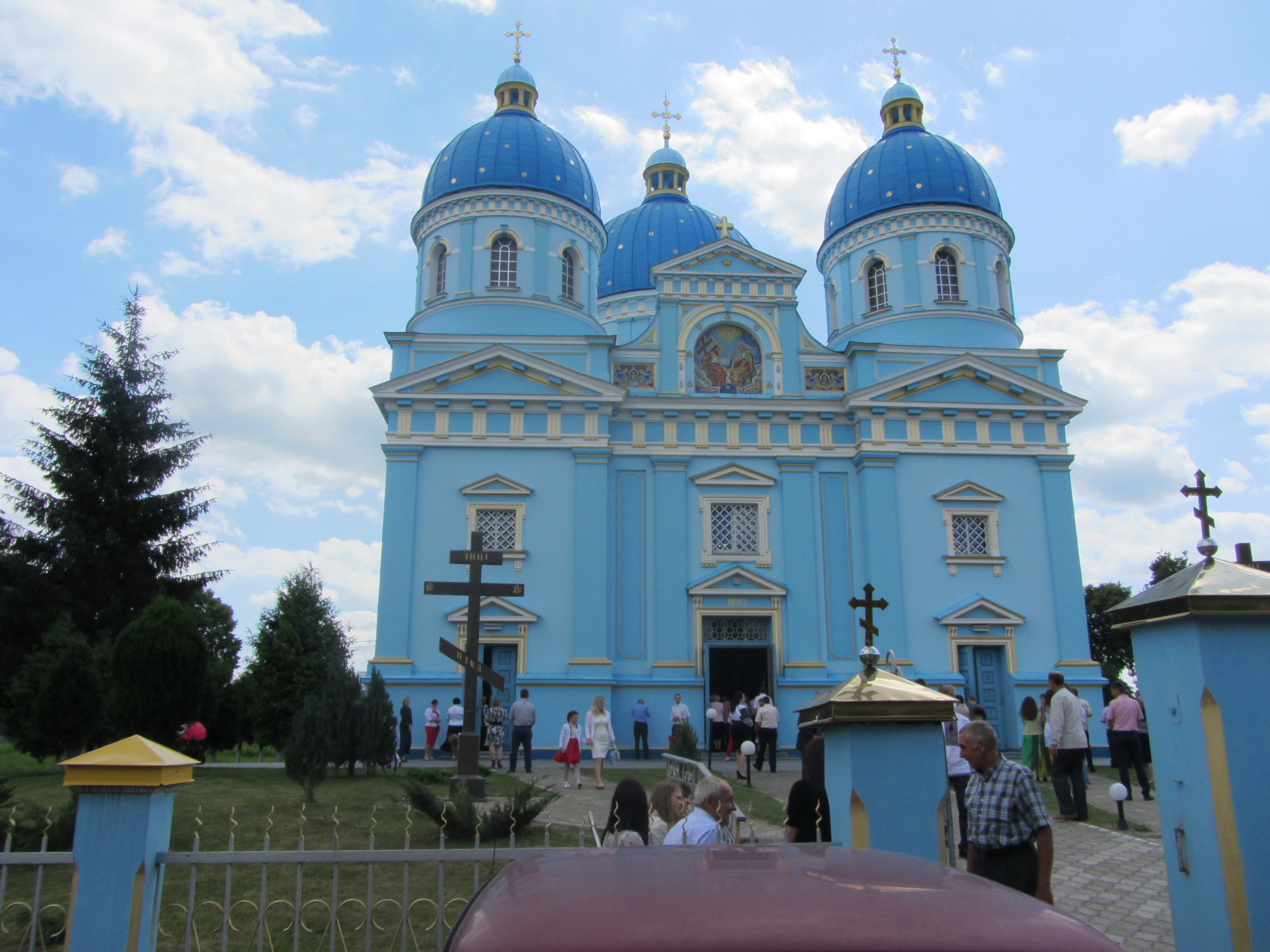 церква в Комарні